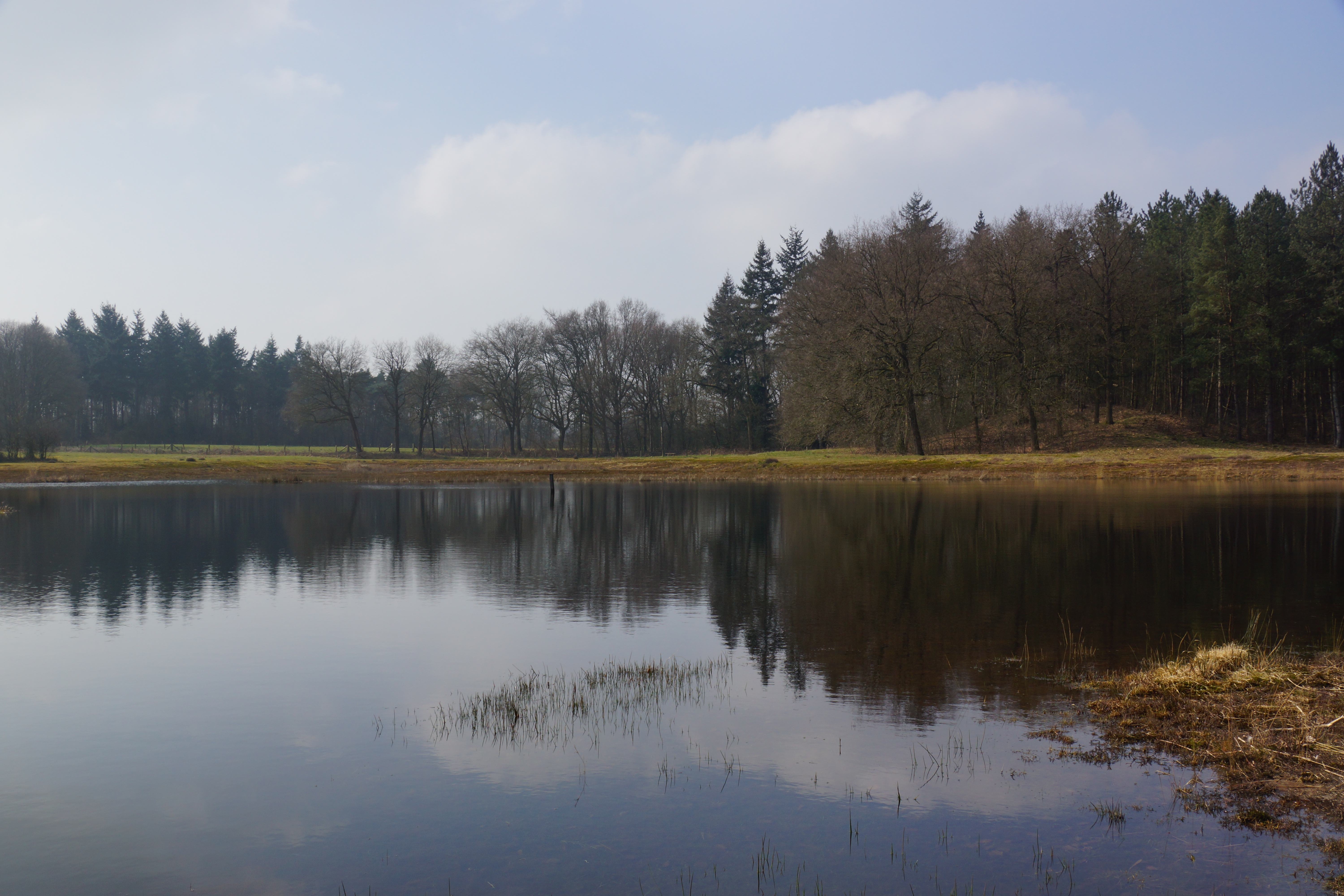 Het 'Grote Ven' Hagen Doetinchem (25)